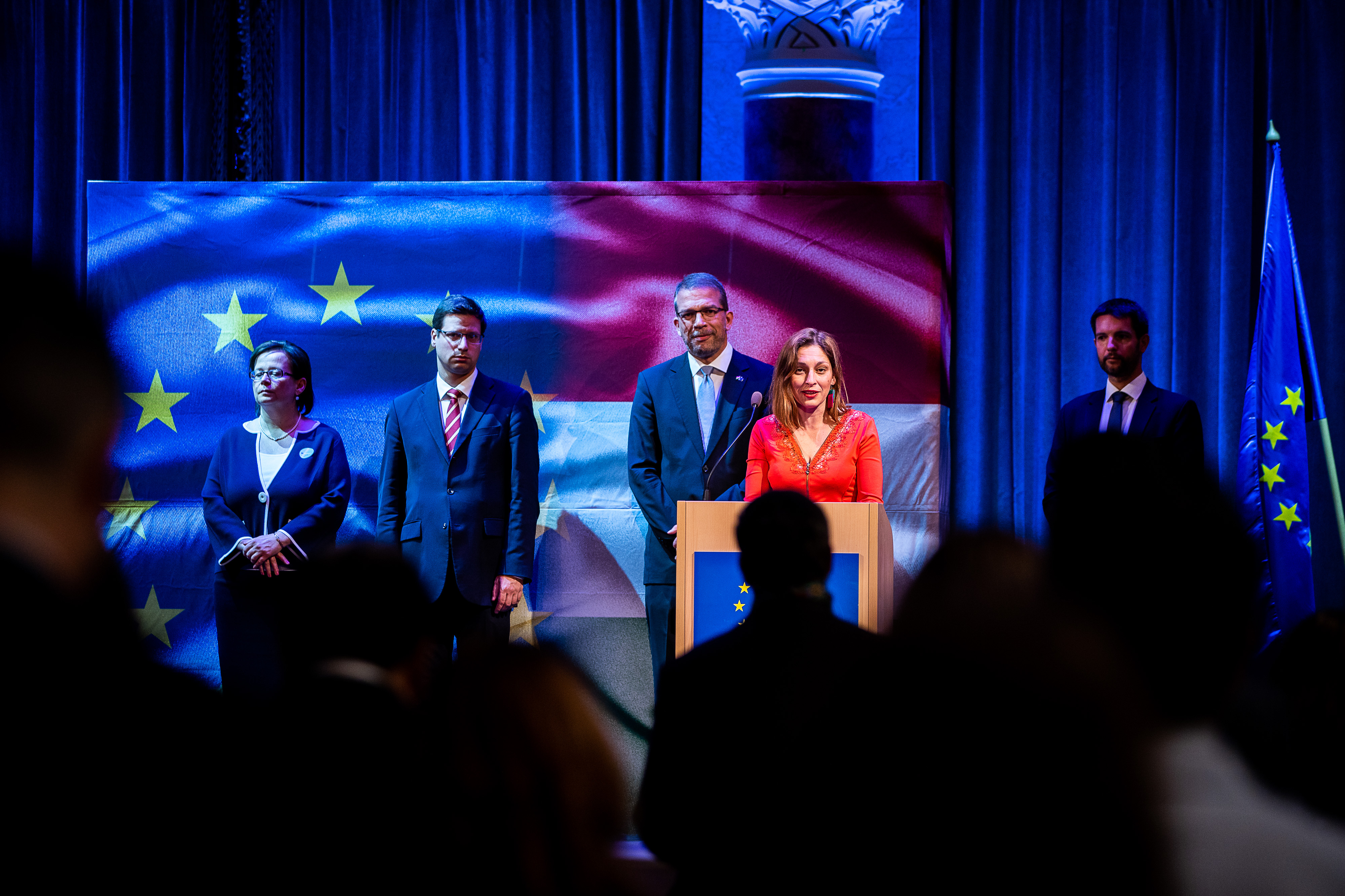 Európa napi fogadás a budapesti Vigadóban. Zupkó Gábor az Európai Bizottság Magyarországi Képviseletének vezetője és Lőwei Andrea az Európai Parlament Magyarországi Kapcsolattartó Irodájának vezetője fogadta a meghívott vendégeket. Beszédet mondott Gulyás Gergely Miniszterelnökséget vezető miniszter és Járóka Lívia az Európai Parlament alelnöke.